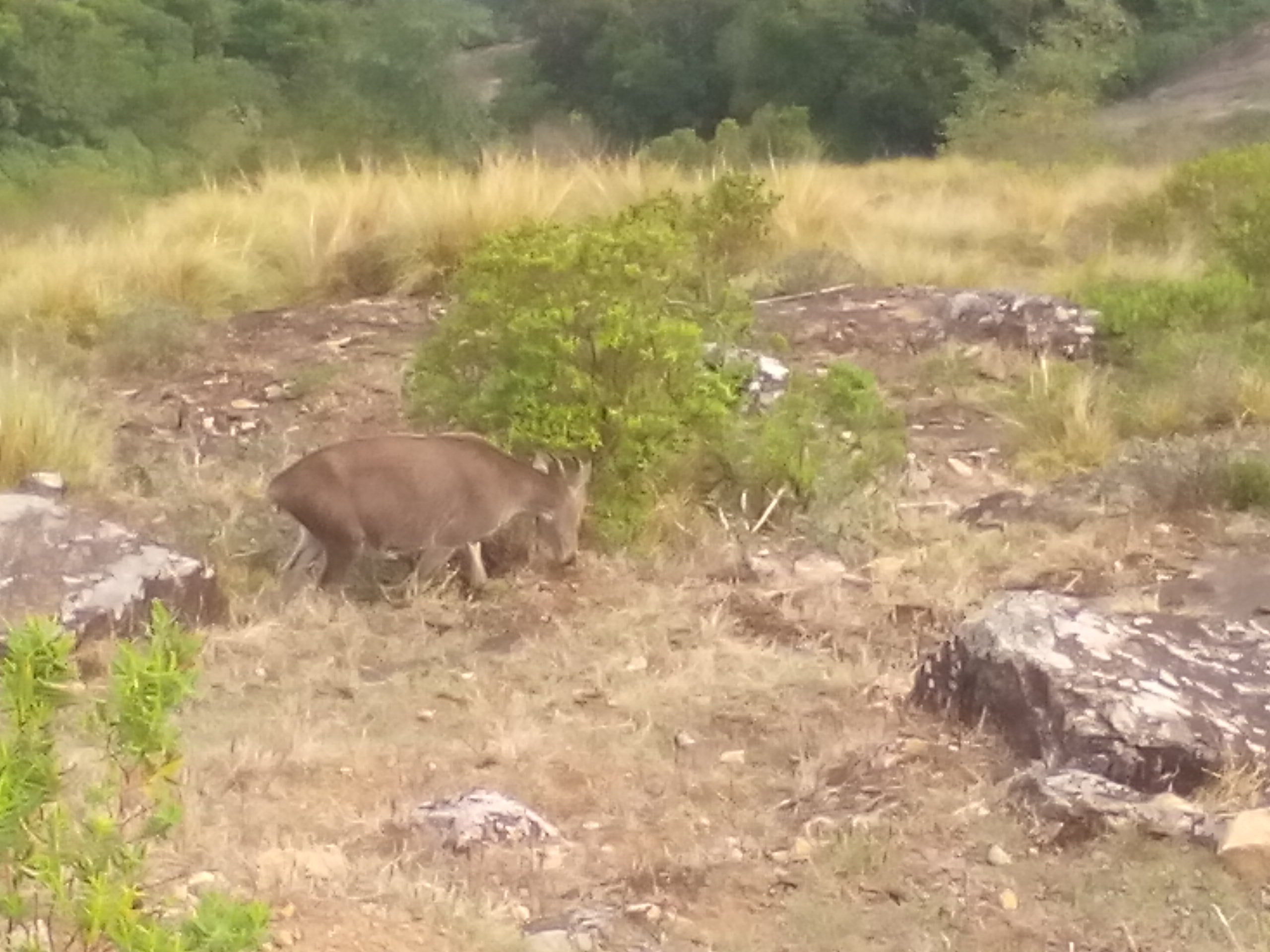 It is Nilagiri Thar from Eravikulam national park